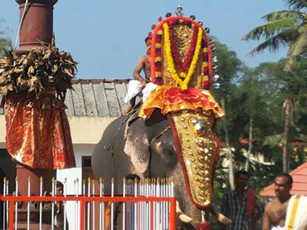 Aarattu